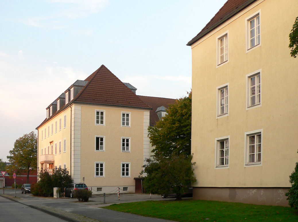 Erste Bebauung in Wolfsburg aus der Zeit um 1938, Kantallee